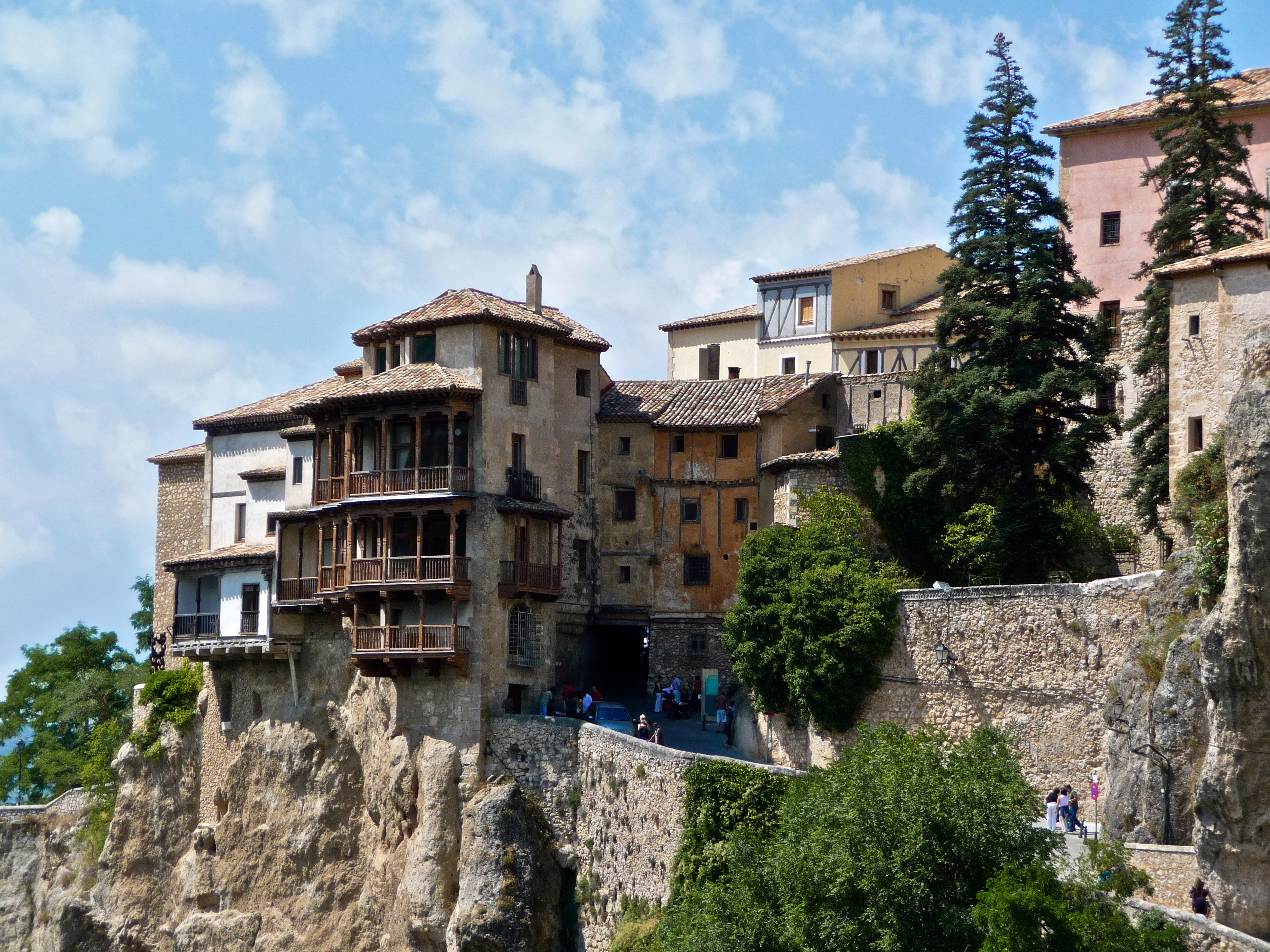 Casas colgantes, Cuenca